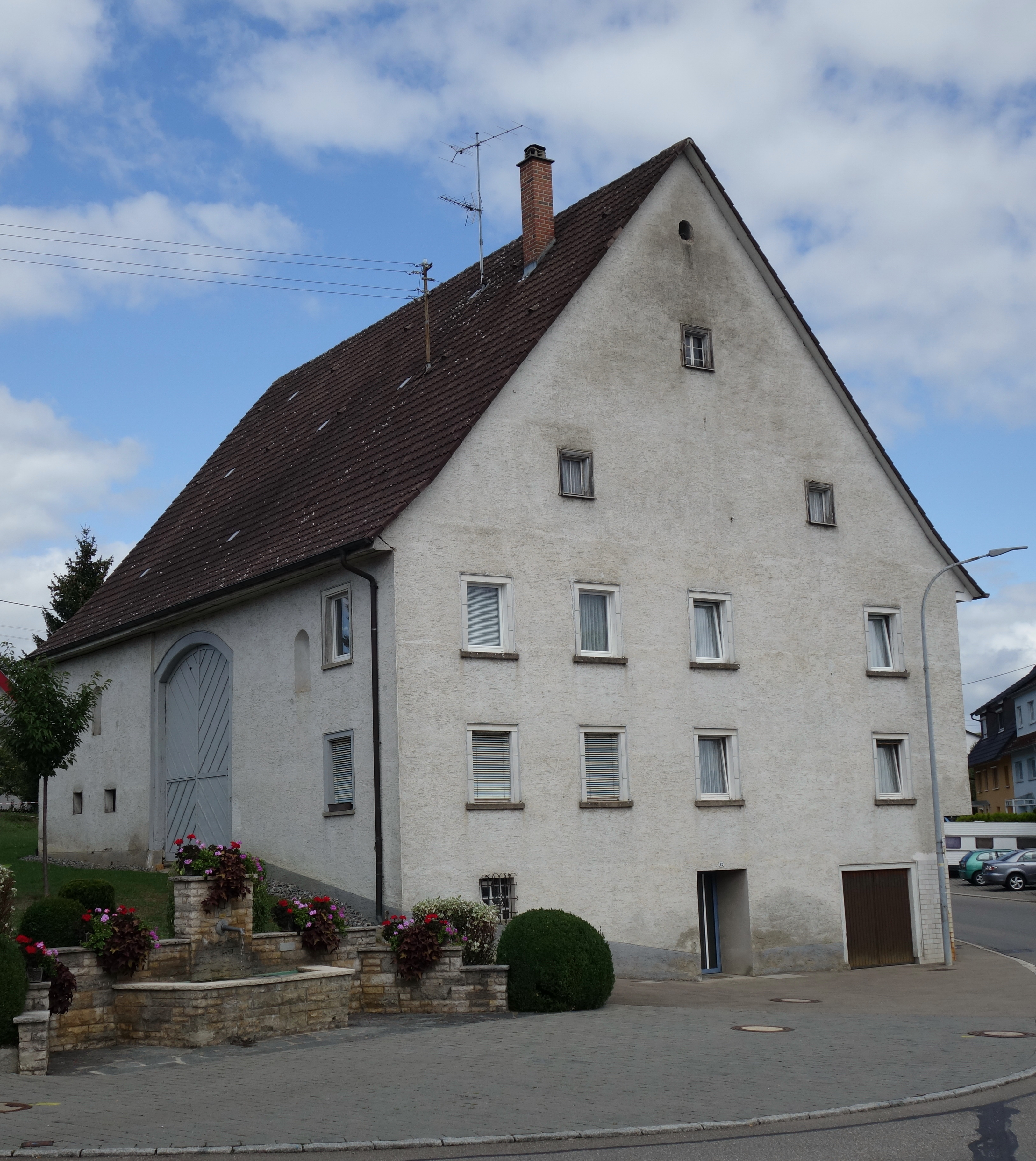 ehemalige Zehntscheuer in Frittlingen, Hauptstraße 67